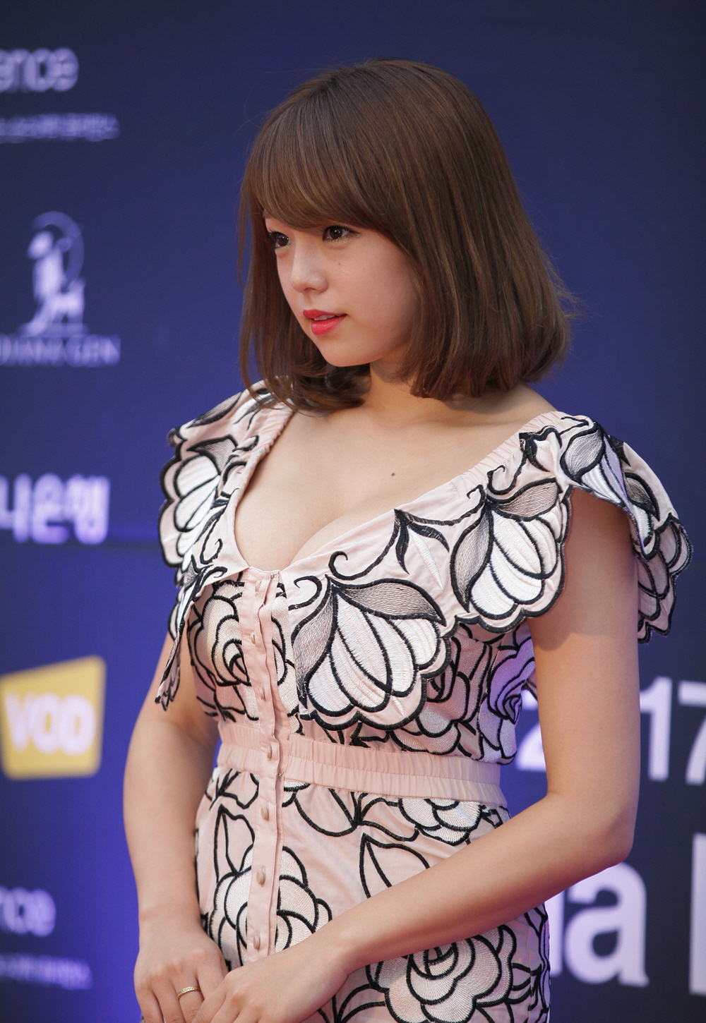 시노자키 아이(Shinozaki Ai) 2017 아시아 모델 페스티벌 레드카펫